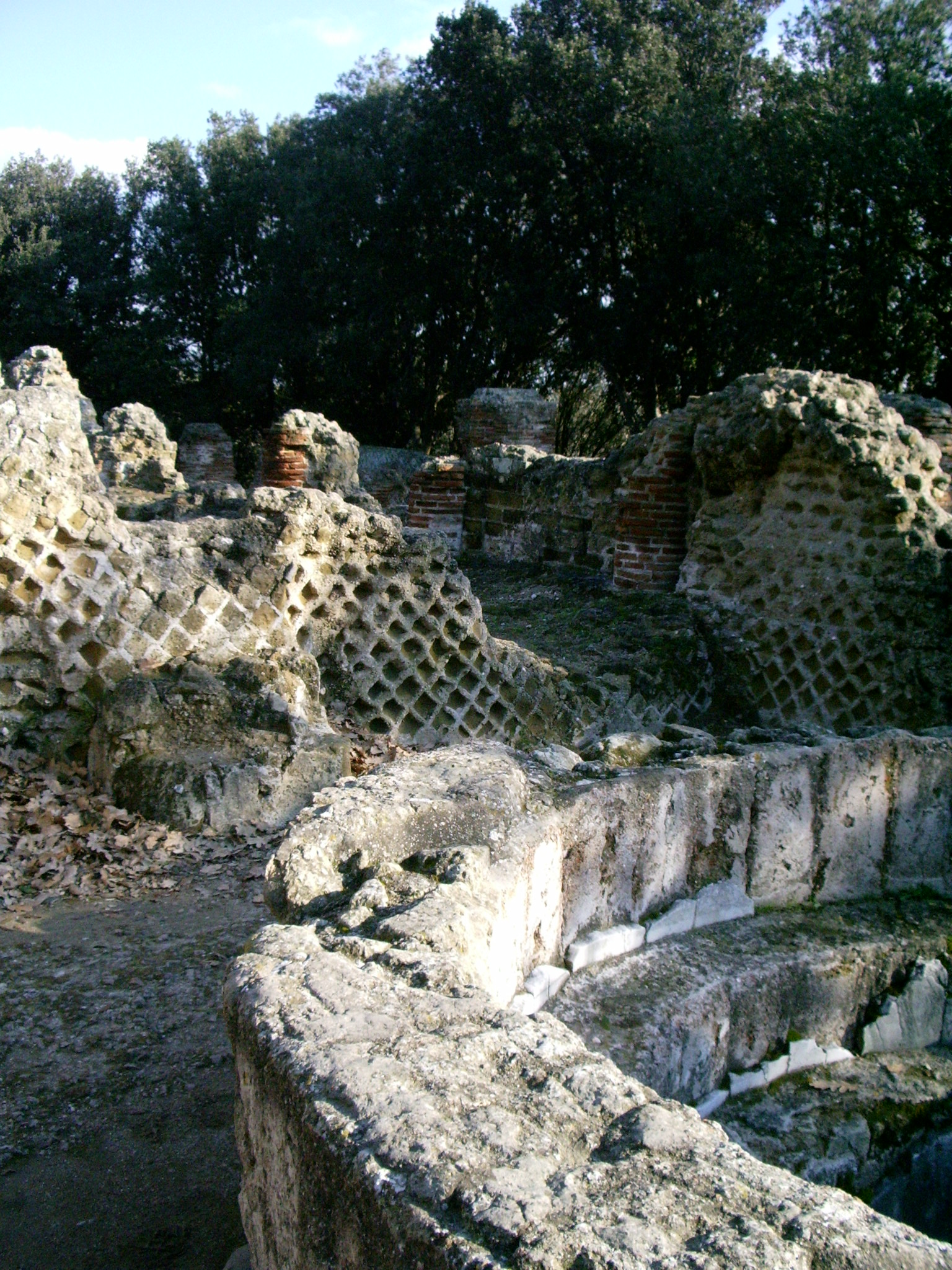 Le temple de Zeus à Cuma fut reconverti en basilique paléochrétienne.